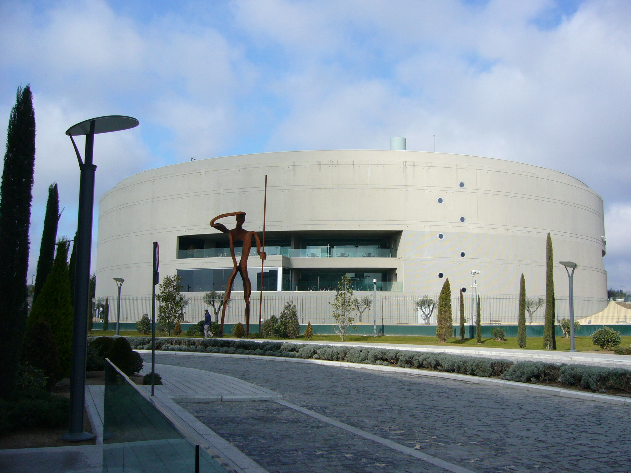 Centro de Control del 112 (Emergencias) de la Comunidad de Madrid en Pozuelo de Alarcón (España). Control Center for Emergency emergencies of the Autonomous Community of Madrid in Pozuelo de Alarcon (Spain).